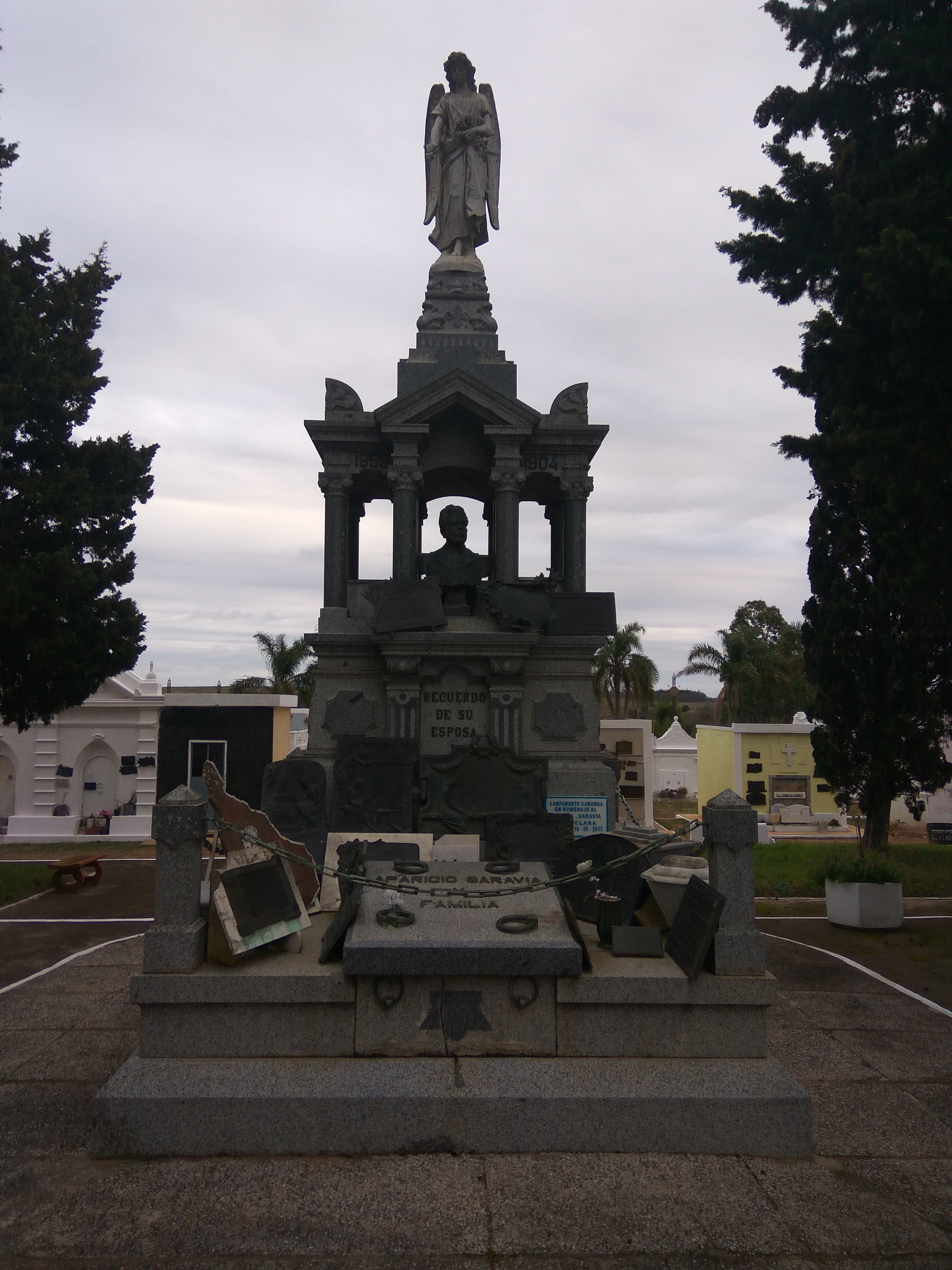 Mausoleo de Aparicio Saravia (1856-1904), militar y político uruguayo. Cementerio de Santa Clara de Olimar, departamento de Treinta y Tres, Uruguay.